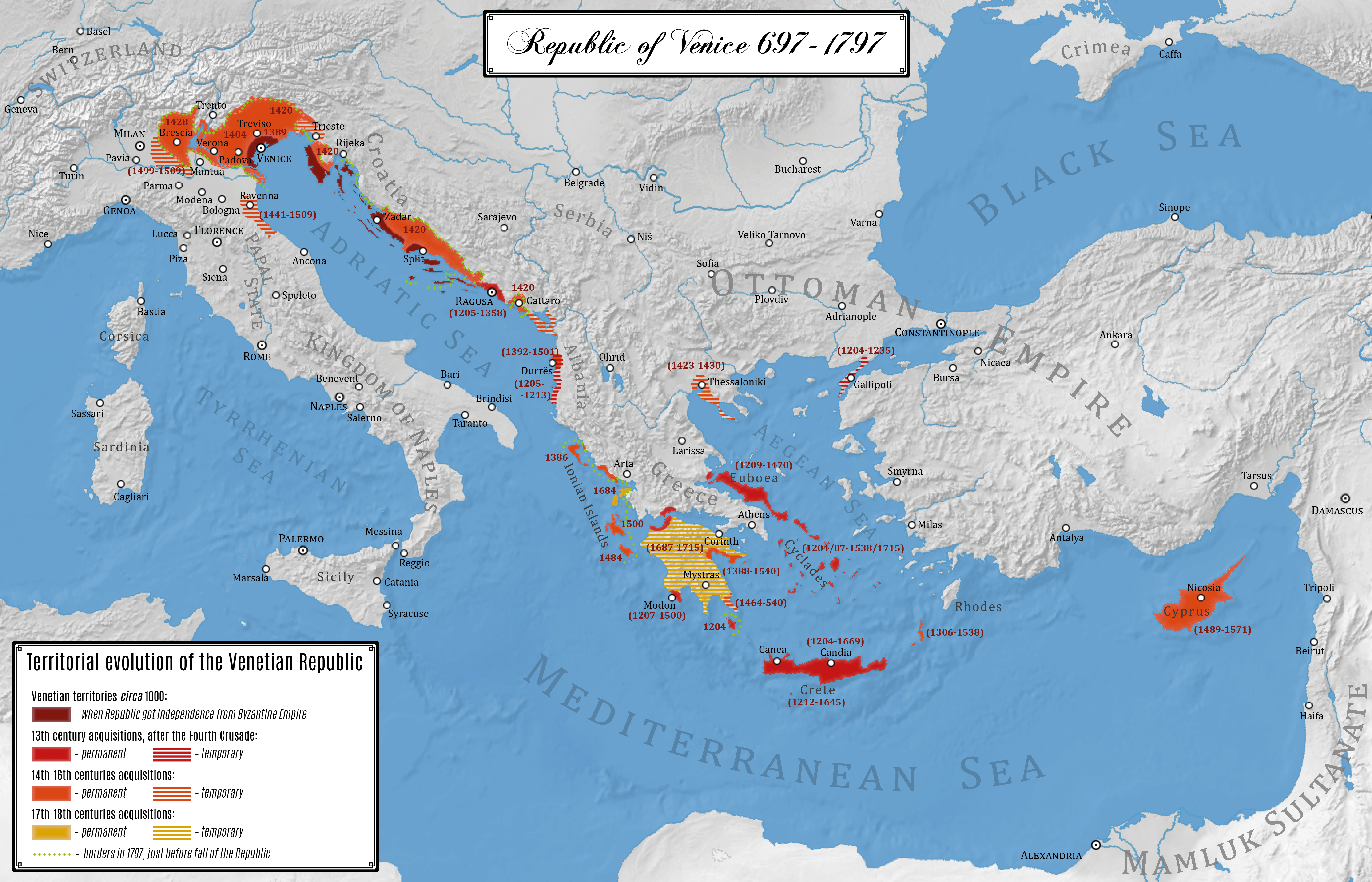 Rozwój terytorialny Republiki Weneckiej